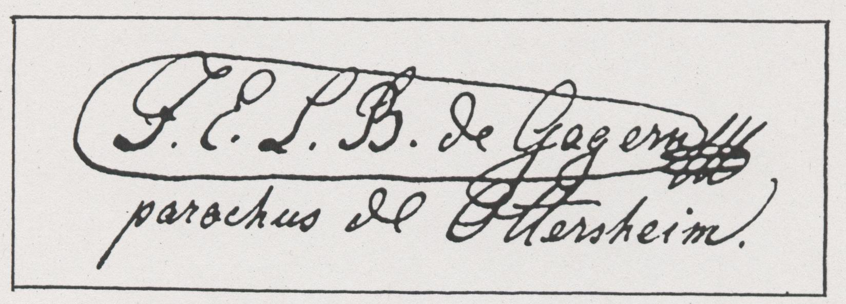 Unterschrift Pfarrer Ernst von Gagern, Diözese Speyer